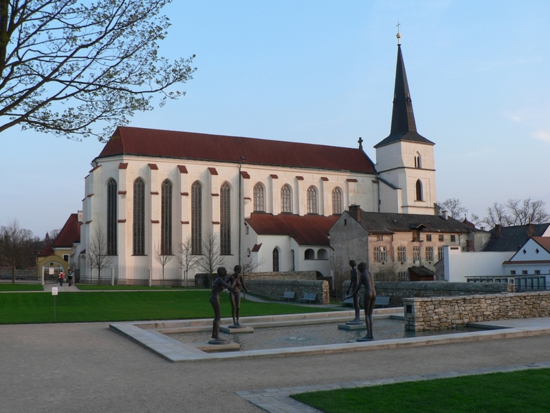 Kostel Povýšení sv. Kříže.